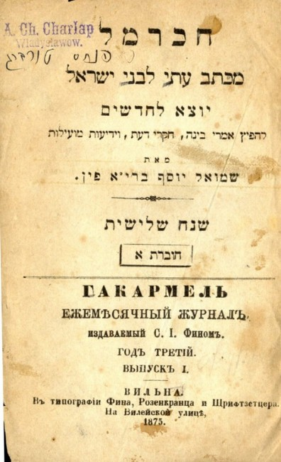 שער כתב העת הכרמל